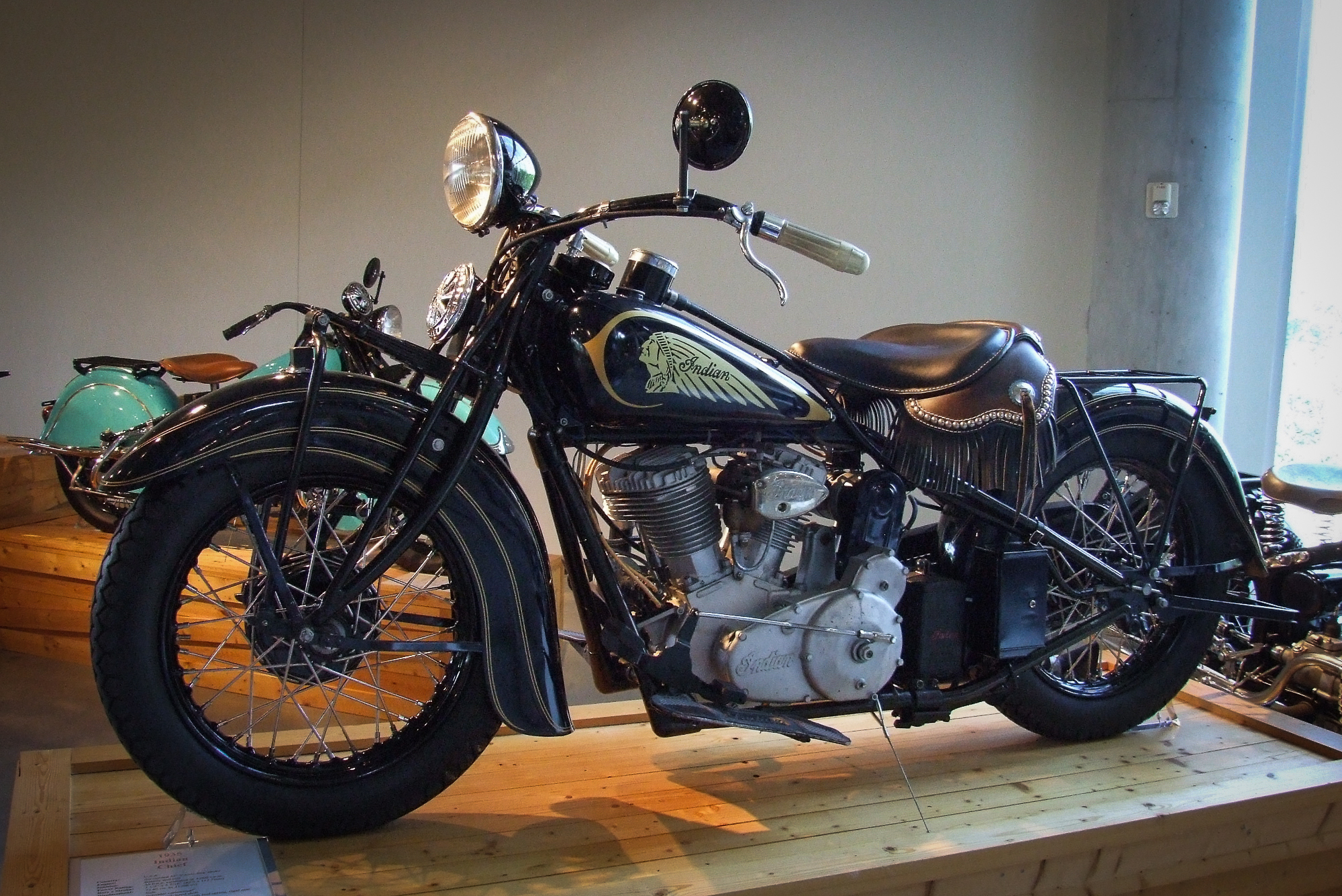 Indian Chief (1935) im Barber Vintage Motorsports Museum, Birmingham Alabama USA